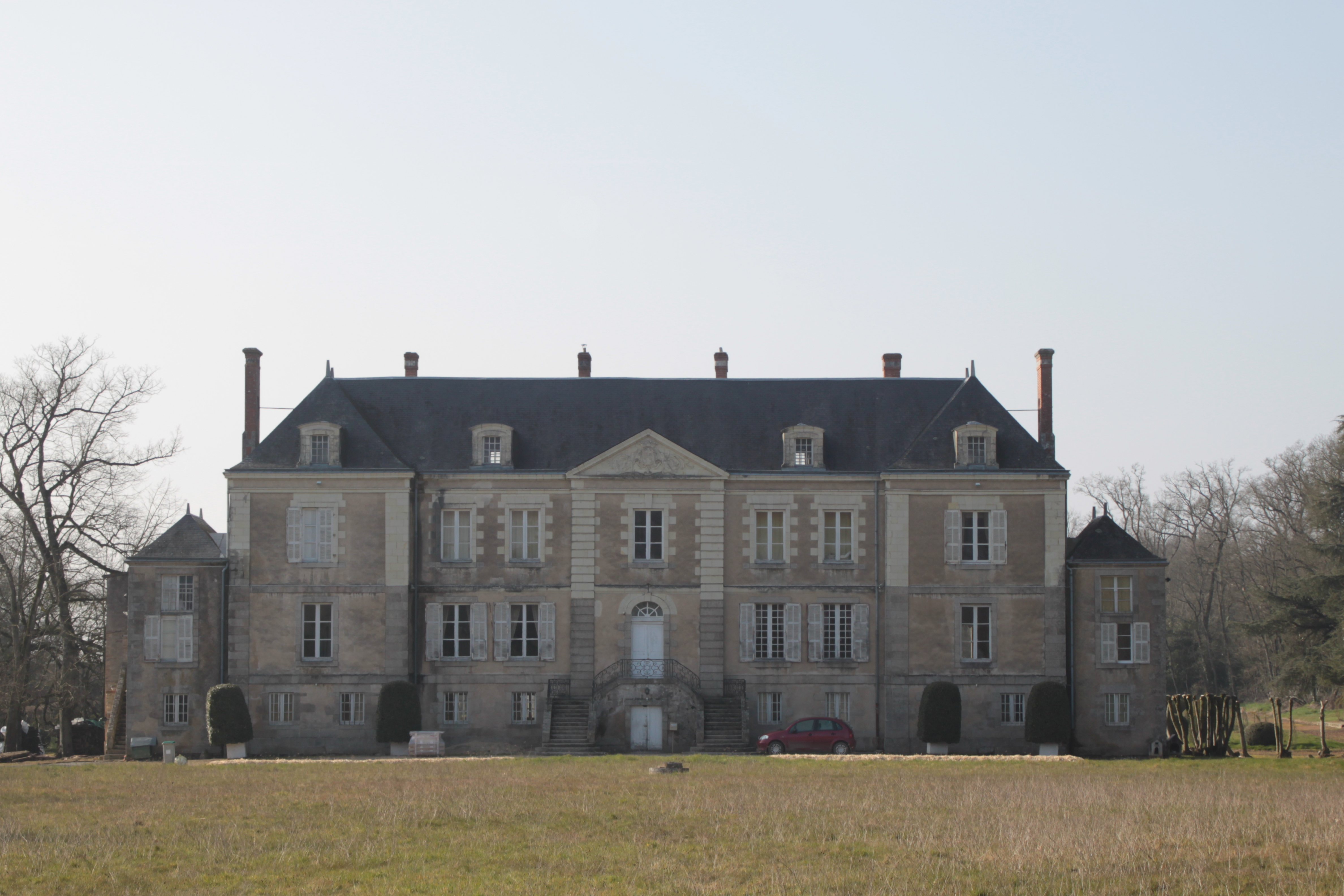 Château de la Lande, façade sud. Fr-85-Saint-Hilaire-de-Loulay.